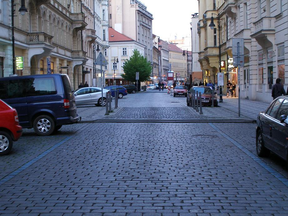 Zúžení komunikace v Dlouhé ulici v Praze.